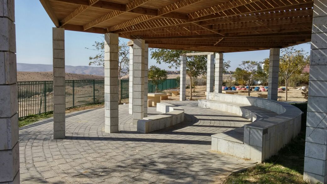 אורט ספיר ירוחם